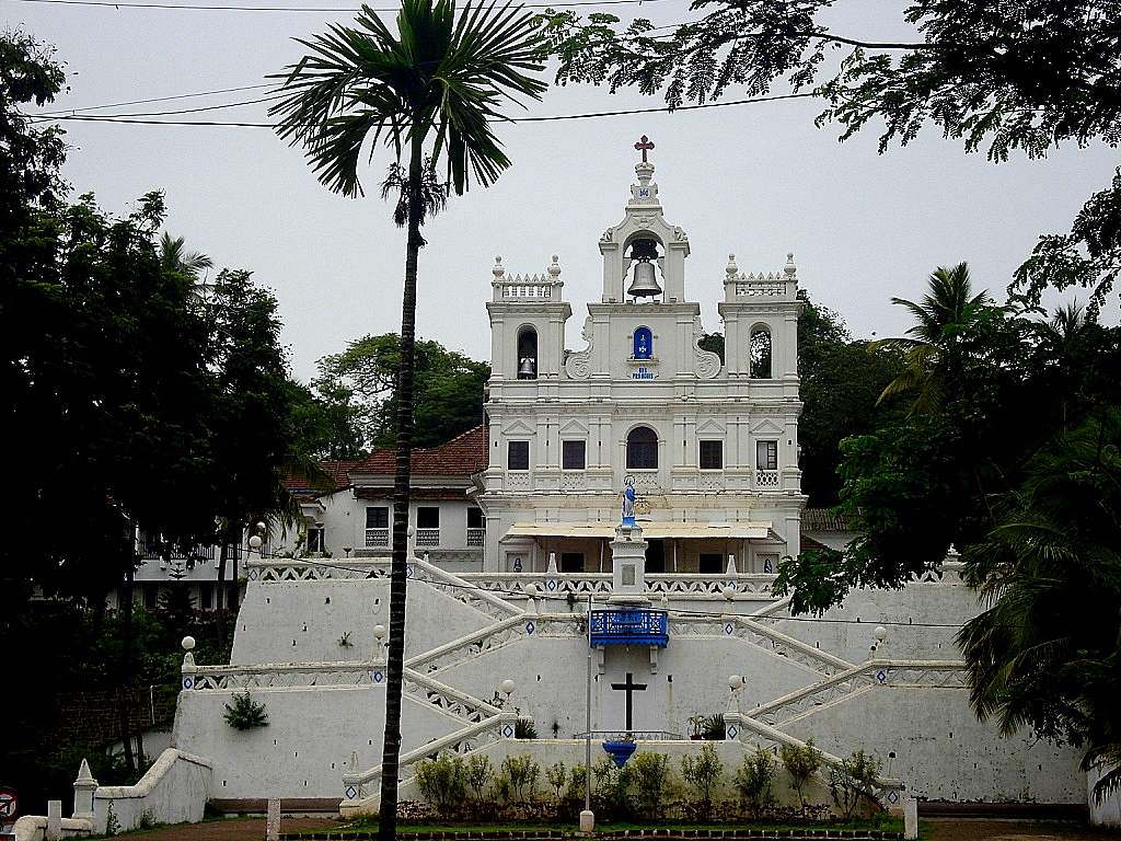 This church was built in 1540 when the entire panaji area was a marsh. This is Panaji's main church where Portuguese sailors gave thanks to Our Lady for a safe voyage.